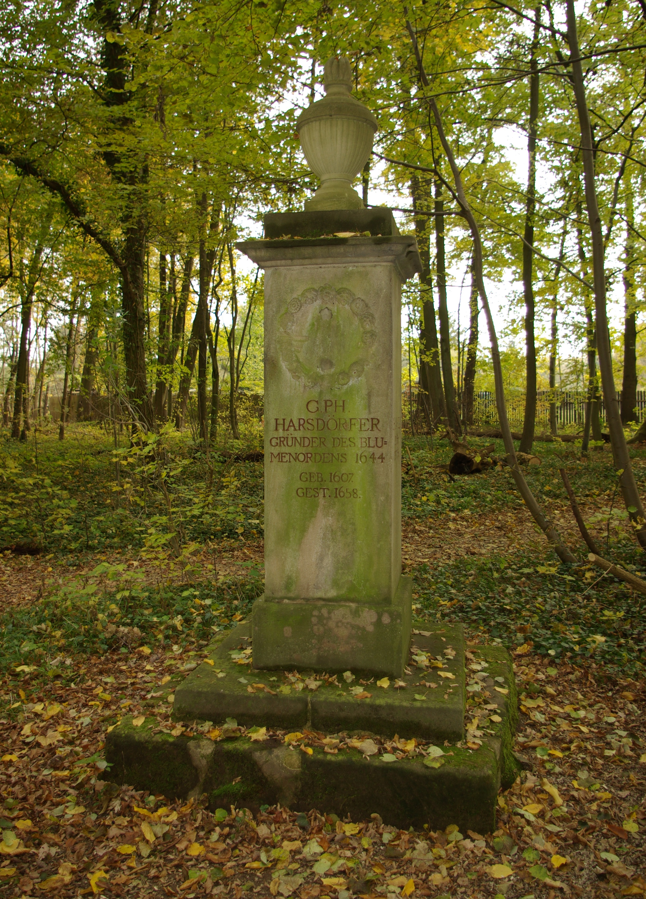 Gedenkstein für Georg Philipp Harsdörffer, Johann Klaj, Johann Friedrich Cramer und Sigmund von Birken im Irrhain bei Kraftshof. Dieser Teil der Anlage wurde als Scheinfriedhof gestaltet.